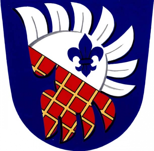 znak, Korolupy, okres Znojmo